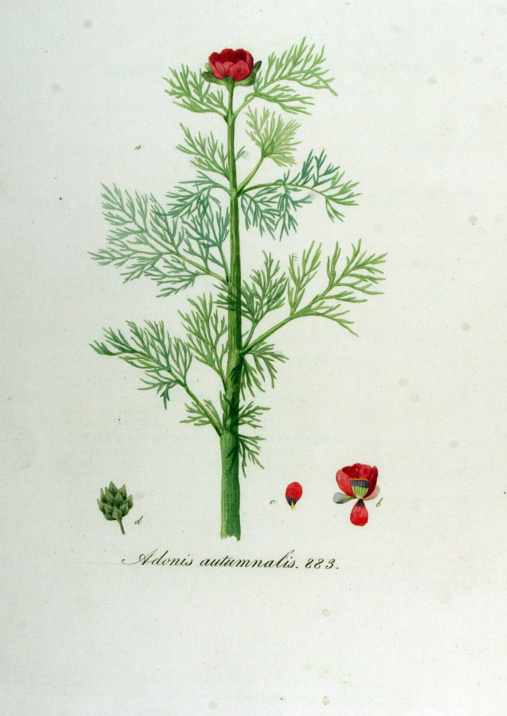 Adonis annua L. (Syn. Adonis autumnalis L.)